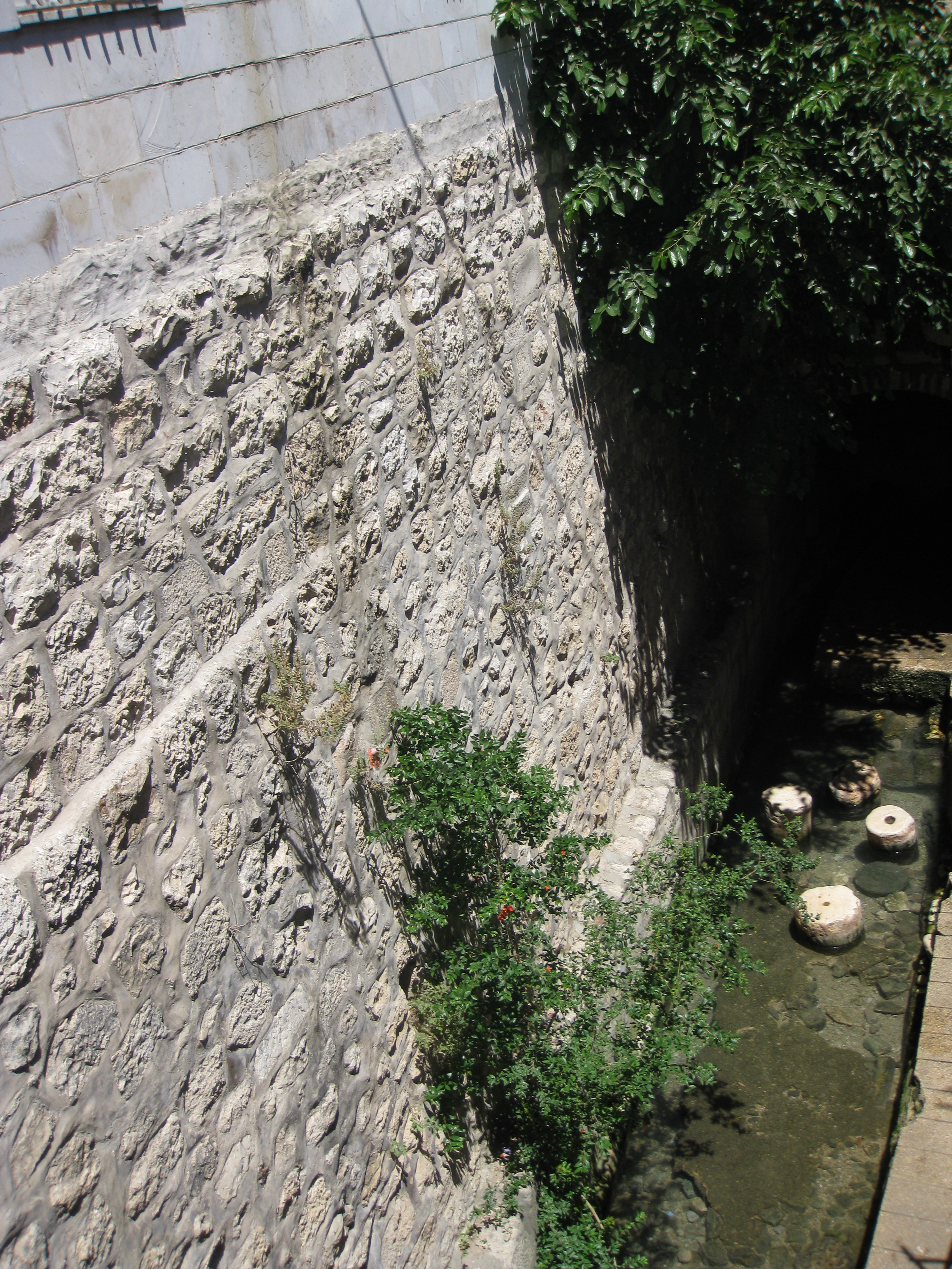 Pool of Siloam בריכת השילוח Byzantine Pool הבריכה מהתקופה הביזנטית